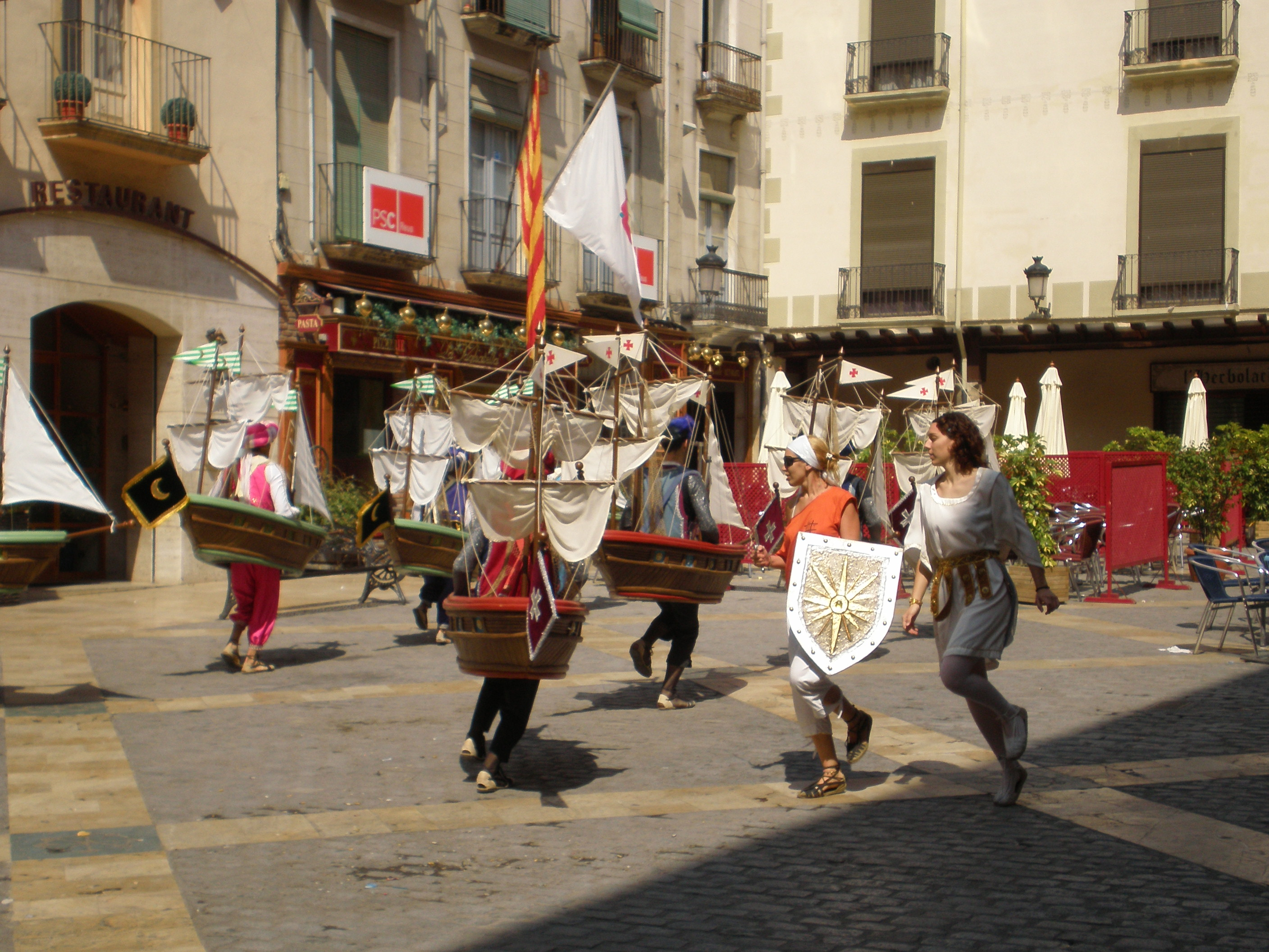 Ball de Galeres de Reus